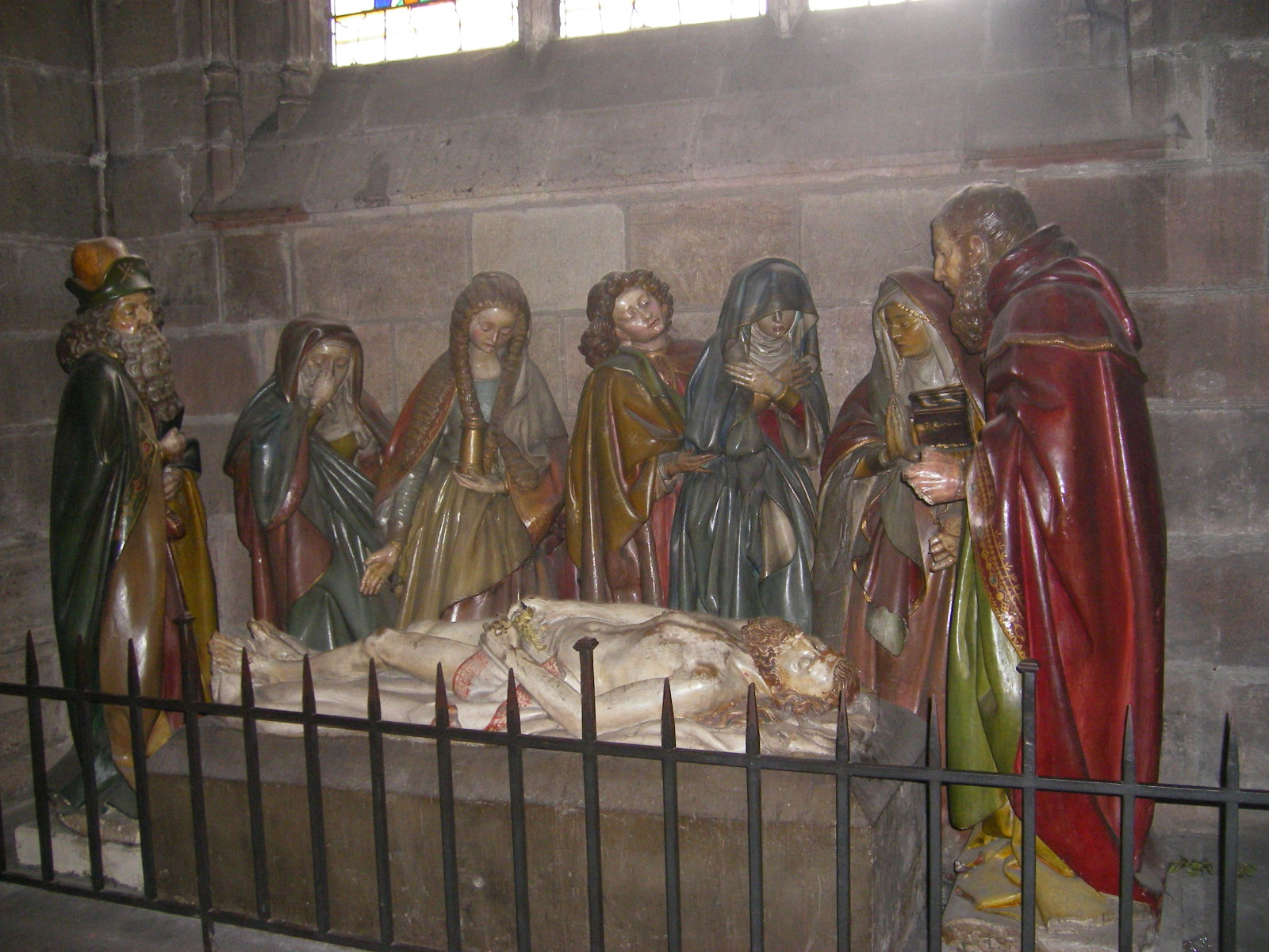 Cathédrale Notre-Dame de Moulins, mise au tombeau du Christ, sculptures en pierre polychrome du XVIe siècle avec de gauche à droite : Nicodème, Salomé, Marie-Madeleine (portant le parfum), saint Jean, la Vierge-Marie, Marie (mère de Jacques) et saint Joseph d'Arismatie.